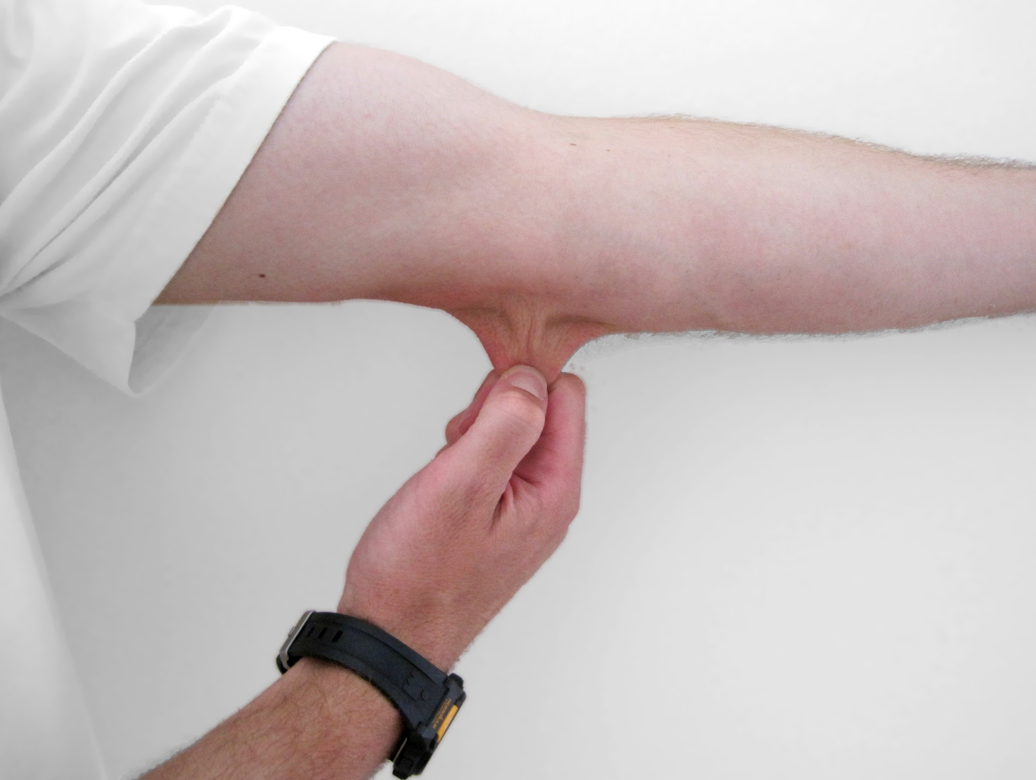 Elbow Skin